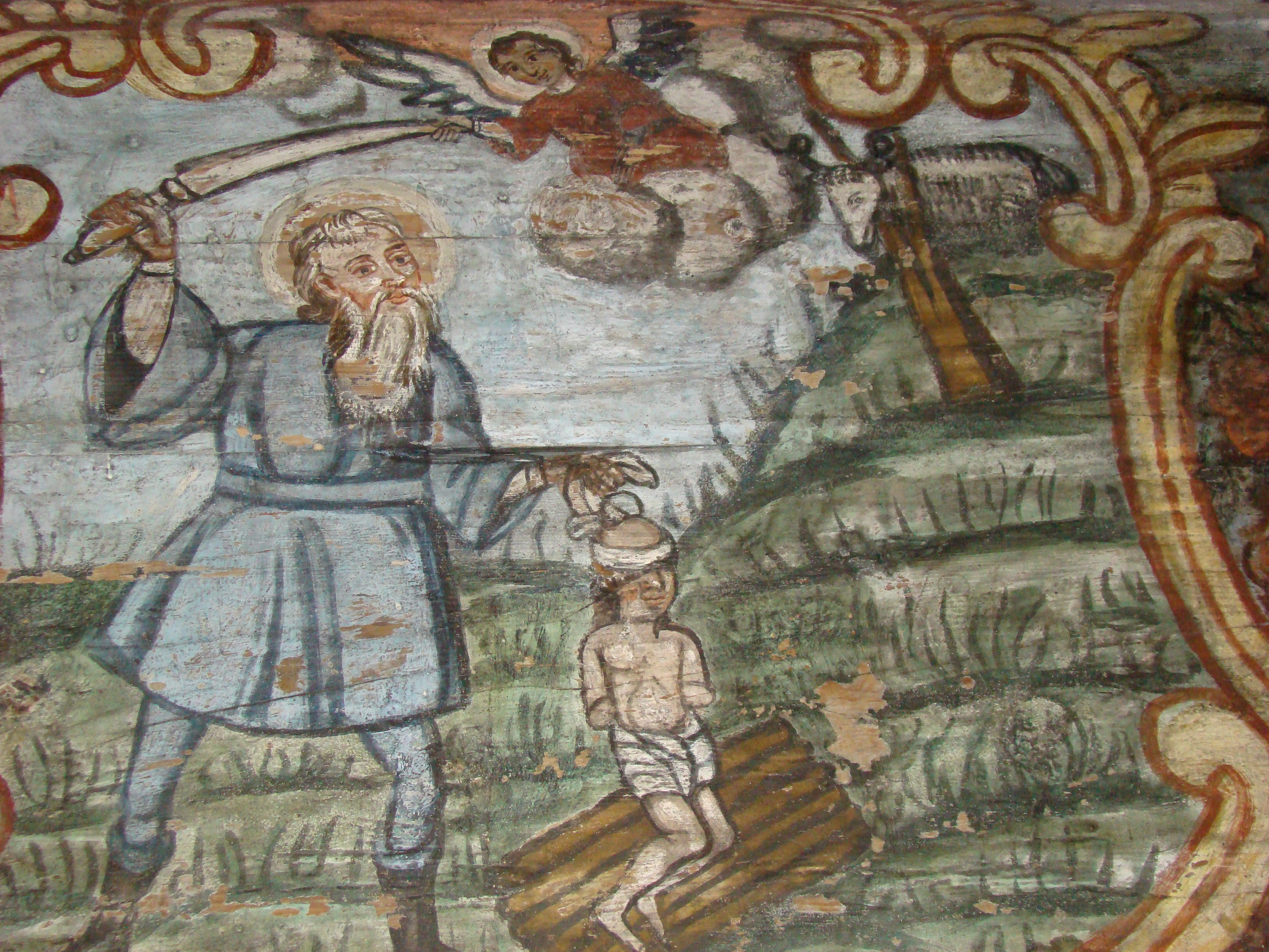 Biserica de lemn din Budești-Josani, județul Maramureș